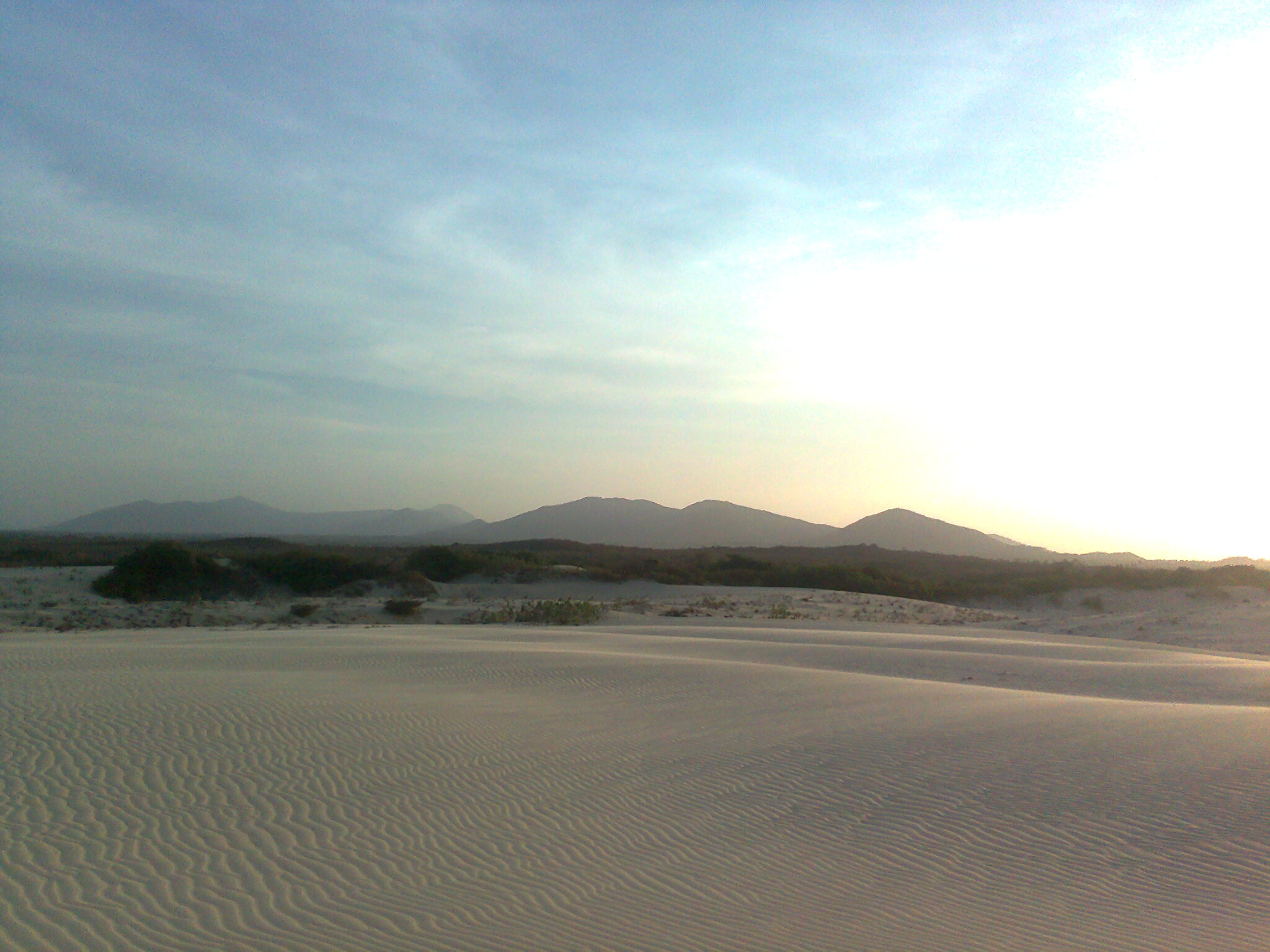 Portugues